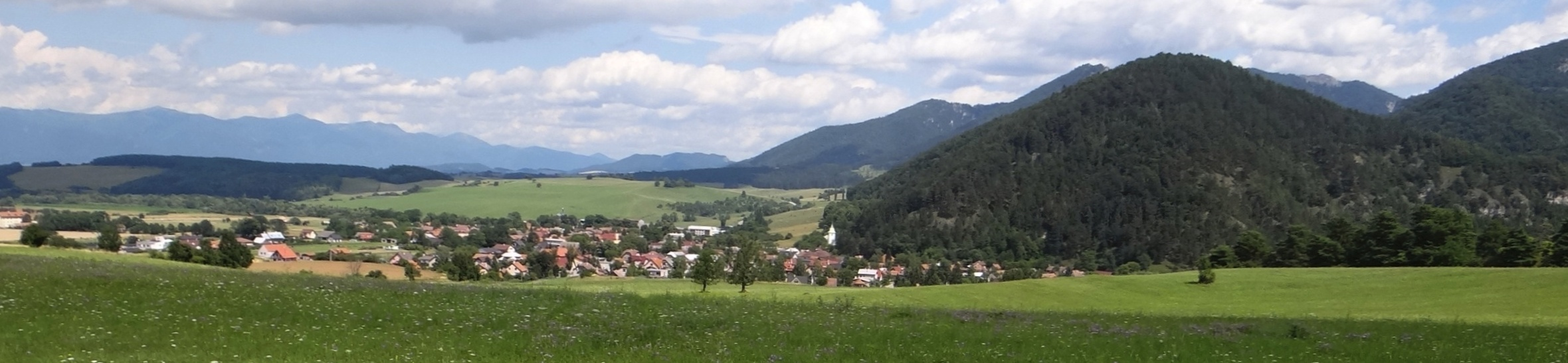 Blatnica